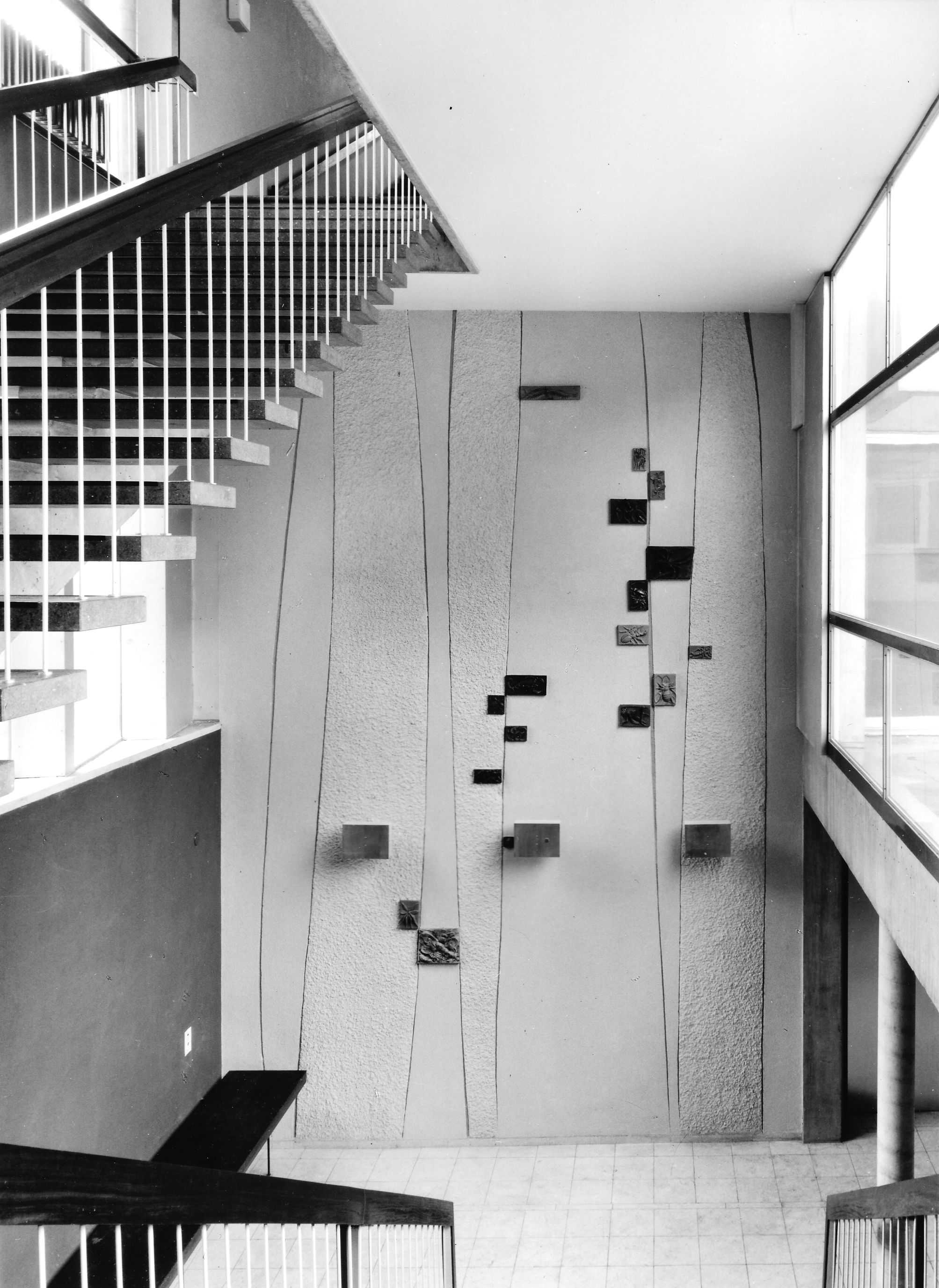 Insekten, Treppenwand mit Keramikfliesen, 1955, Olgastift, Stuttgart.